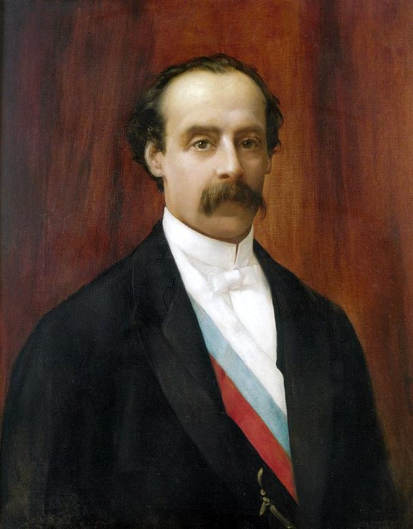 Retrato de José Manuel Balmaceda (1840-1891), presidente de Chile entre 1886 y 1891.